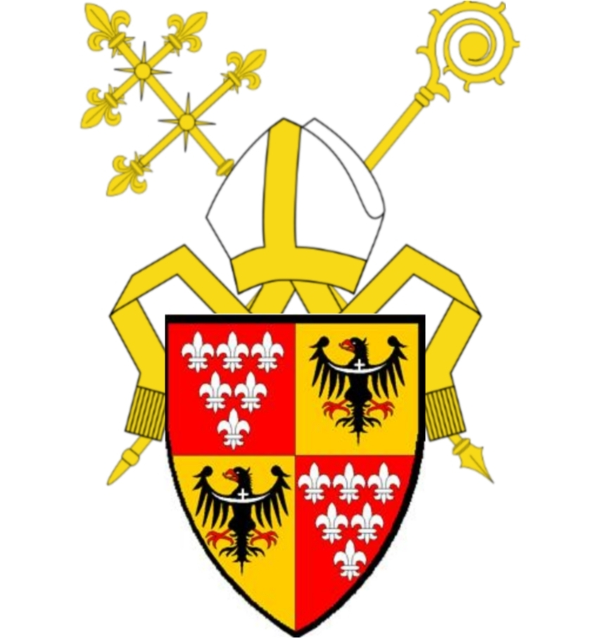 Wappen des Erzbistums Breslau (Wroclaw)